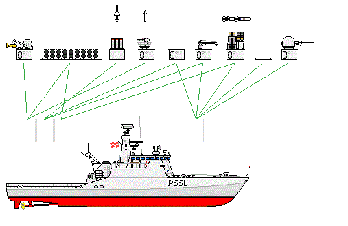 StanFlex-systemet